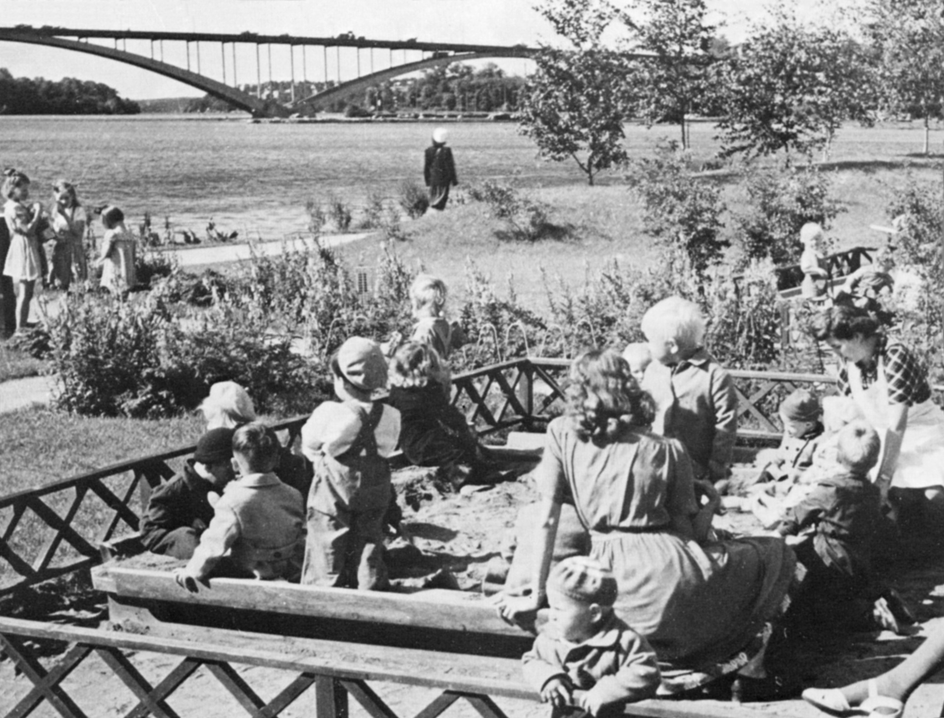 Parklek i parken längs Norr Mälarstrand, Stockholm